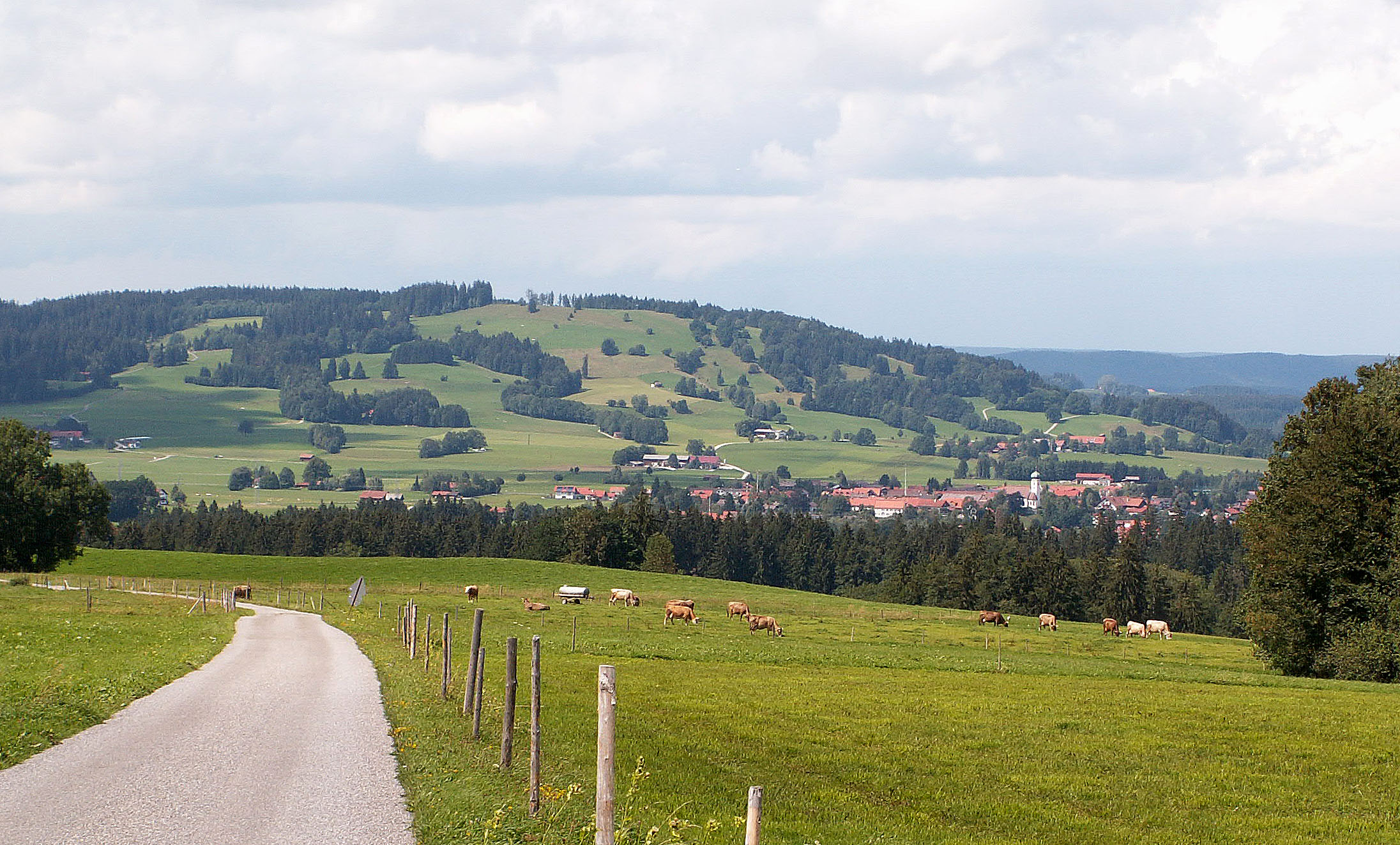 Böbing mit Schnalz